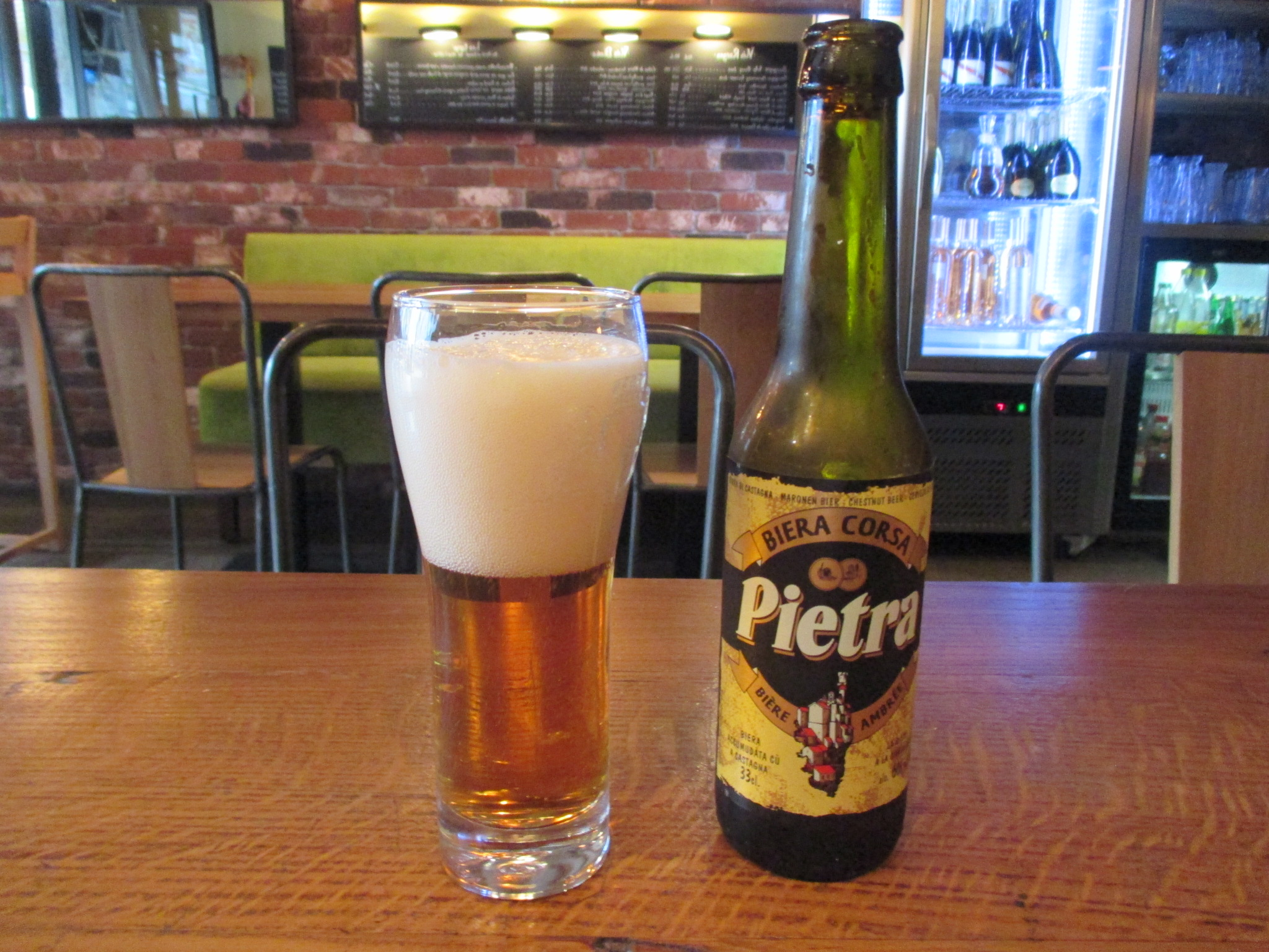 Biere Pietra